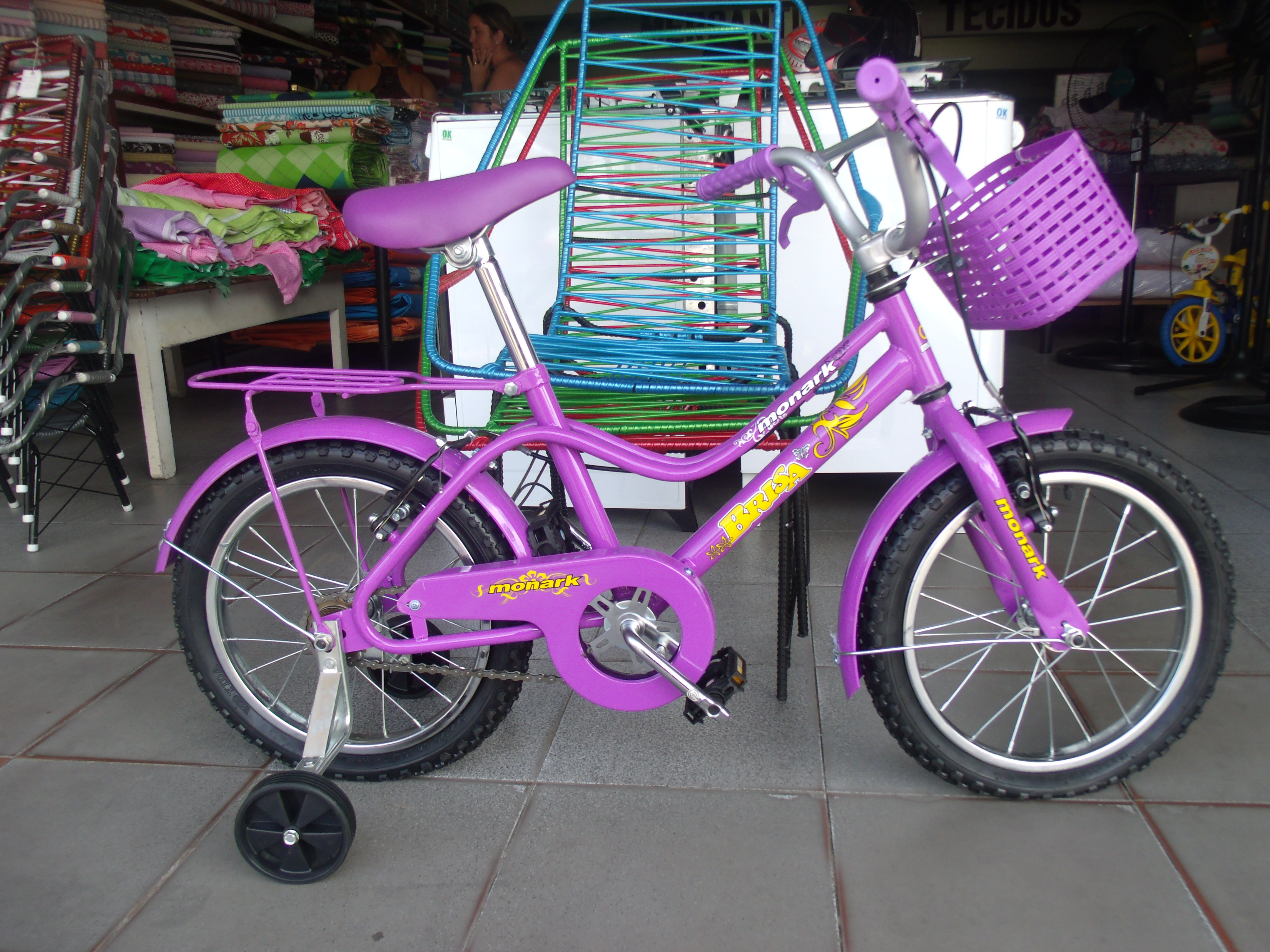 Bicicleta monark, modelo brisa feminina infantil, aro 16 em uma loja em Campo Maior, no Piauí.